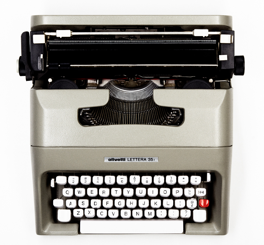 Olivetti Lettera 35i Typewriter Mario Bellini